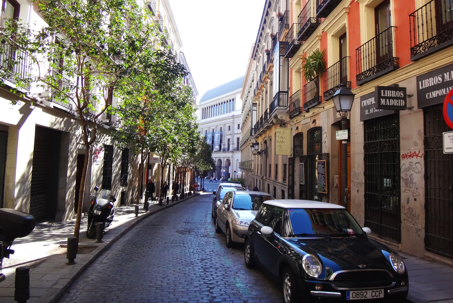 Улочки Мадрида